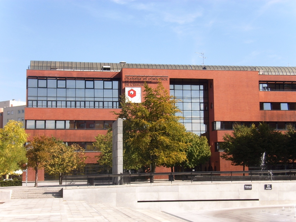 Hôtel de la Chambre de commerce et d'industrie de l'Essonne à Évry